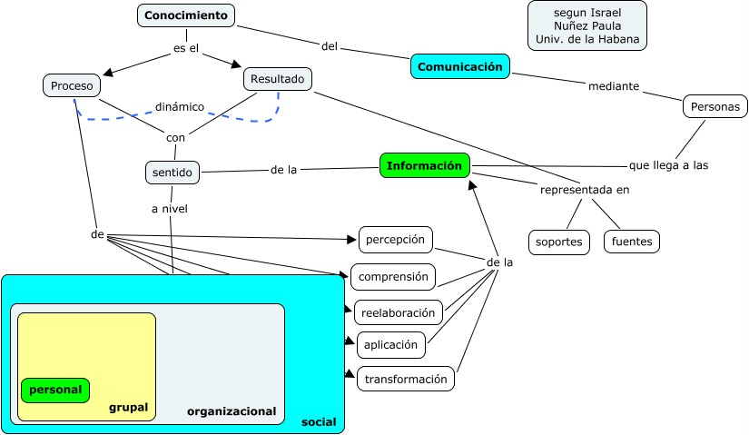 El conocimiento según Israel Nuñez Paula de la Univ. de la Habana. Extensa documentacion en Visionar en formato HTML